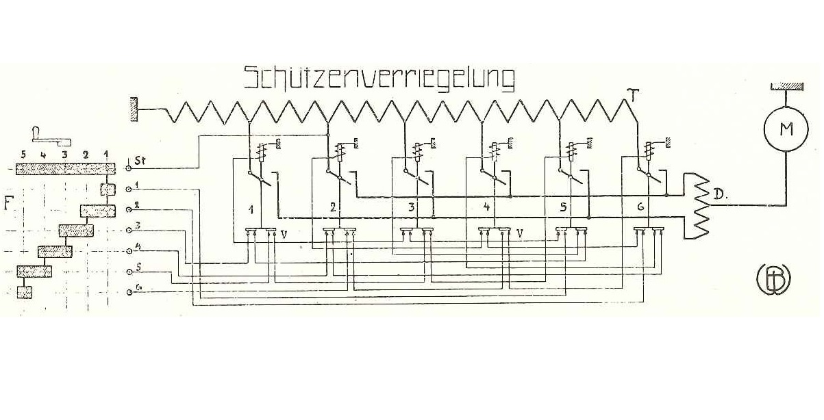 Prinzipskizze einer Schützensteuerung